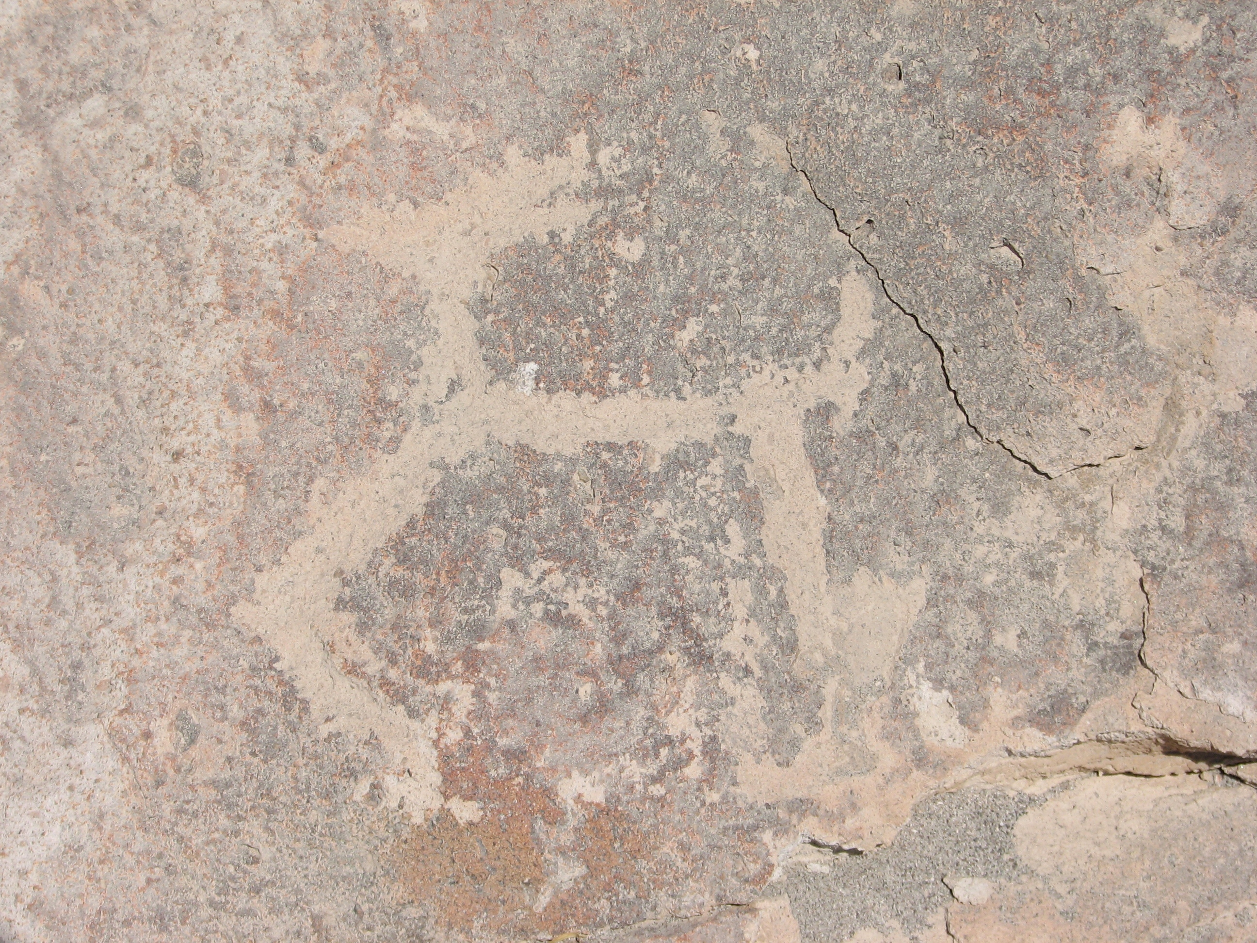 Toro Muerto Archaeological site (petroglyph llama)